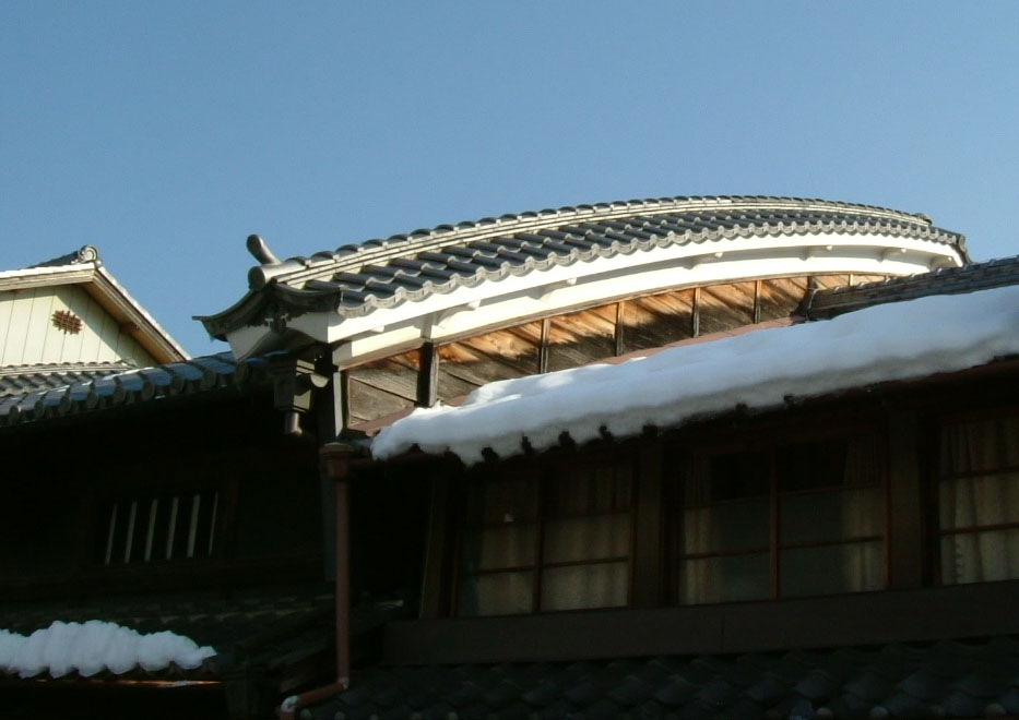 うだつのクローズアップ cropped with Finepix Viewer.